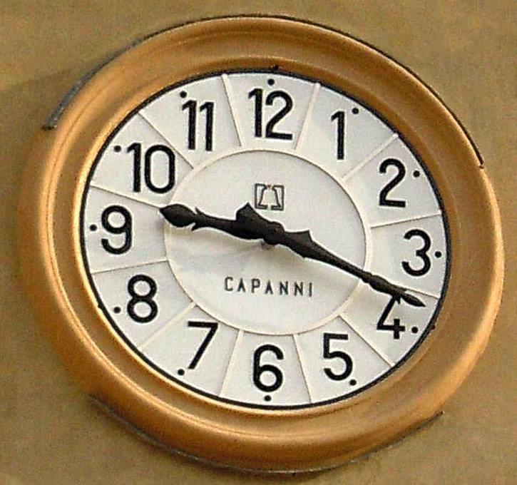 Castel Goffredo, orologio della torre civica (1438).